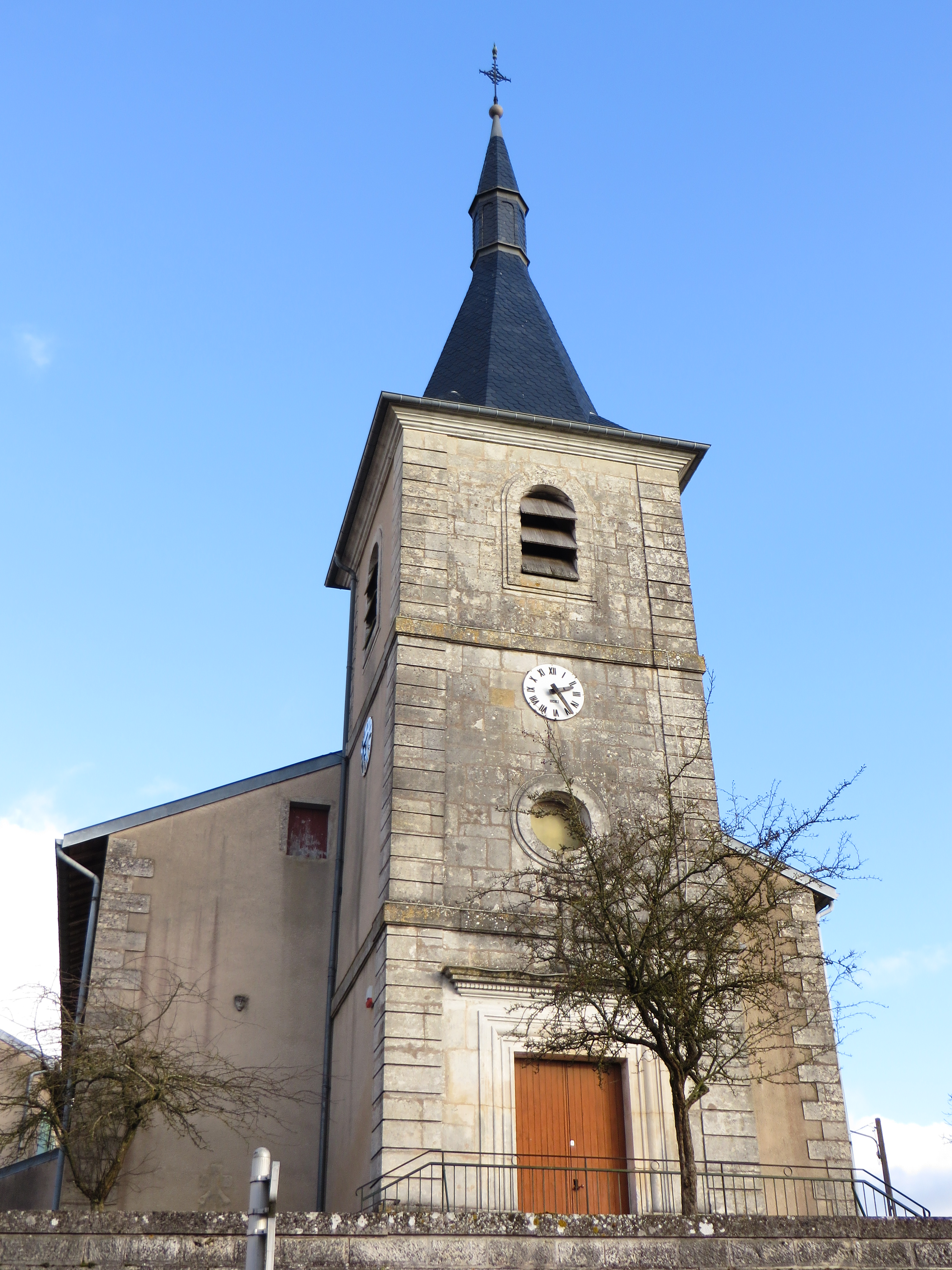 Manonville eglise